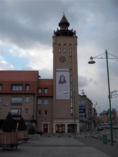 Beffroi de Saint-Pol-sur-Mer Photo prise le 28 décembre 2005